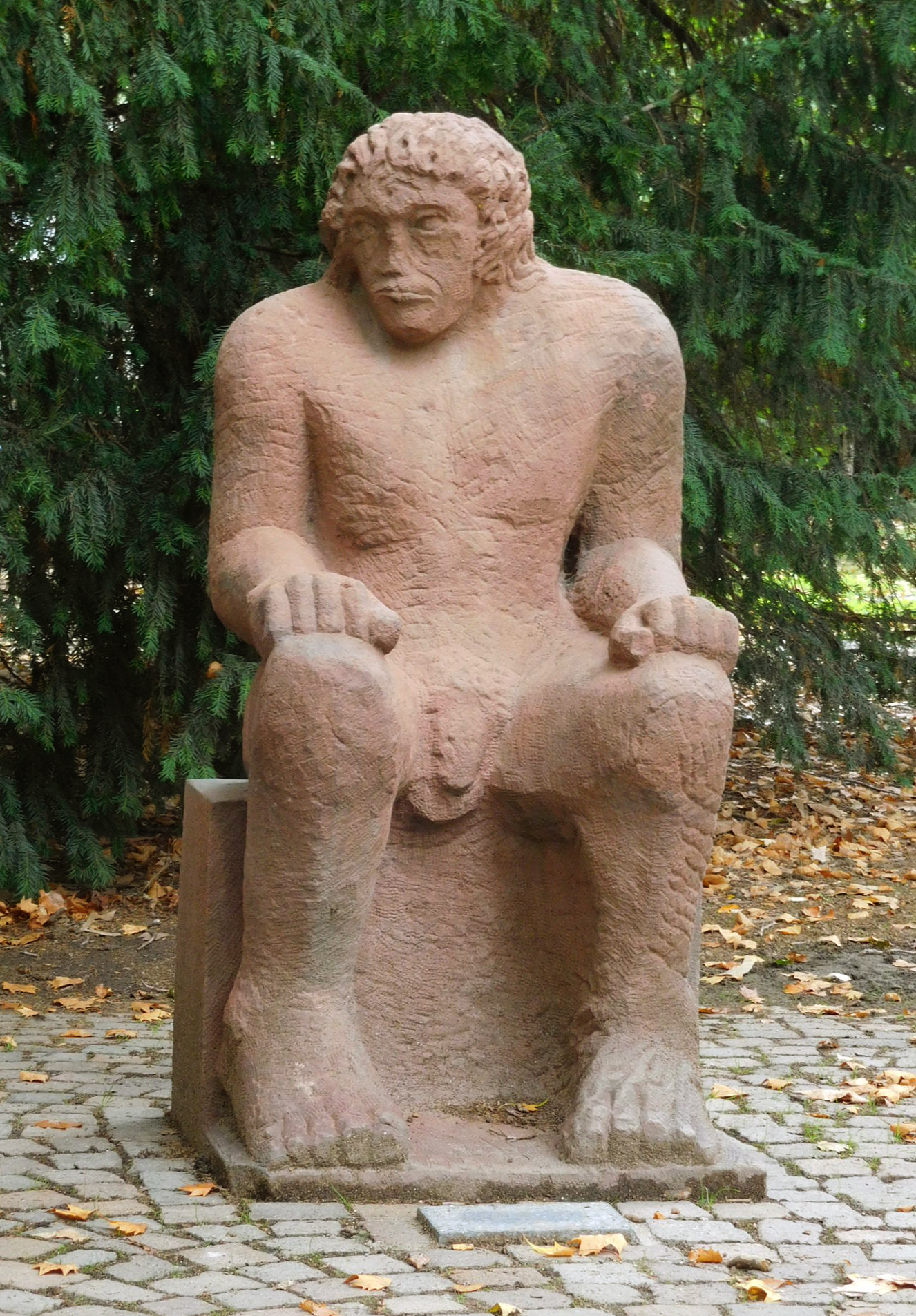 Michael Siebel (*1951 in Frankfurt am Main, Sitzender Sandsteinskulptur. Eschenheimer Anlage, Frankfurt am Main